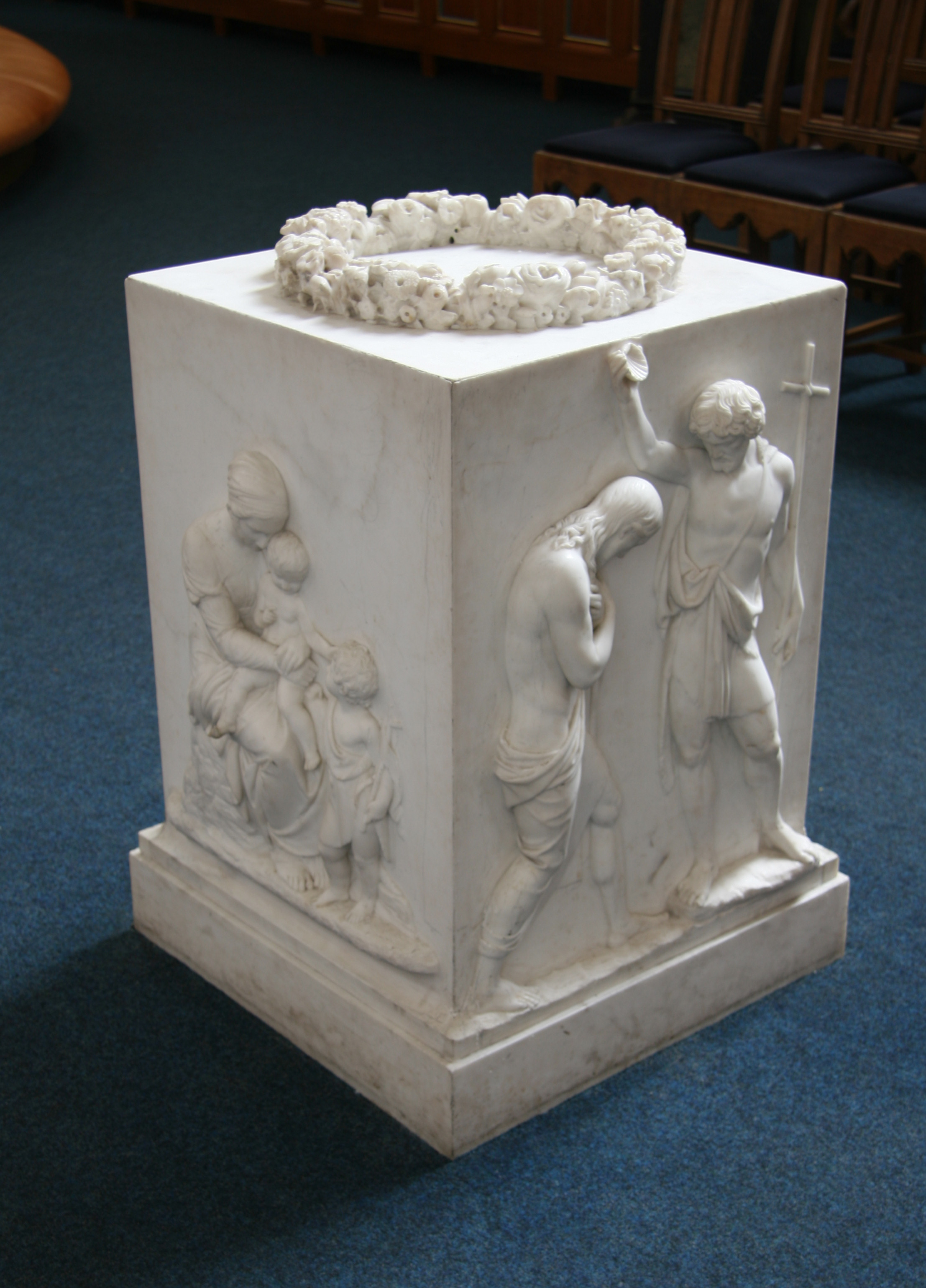 Helligåndskirken, Copenhagen, Denmark. Baptismal font by Thorvaldsen. 1827.